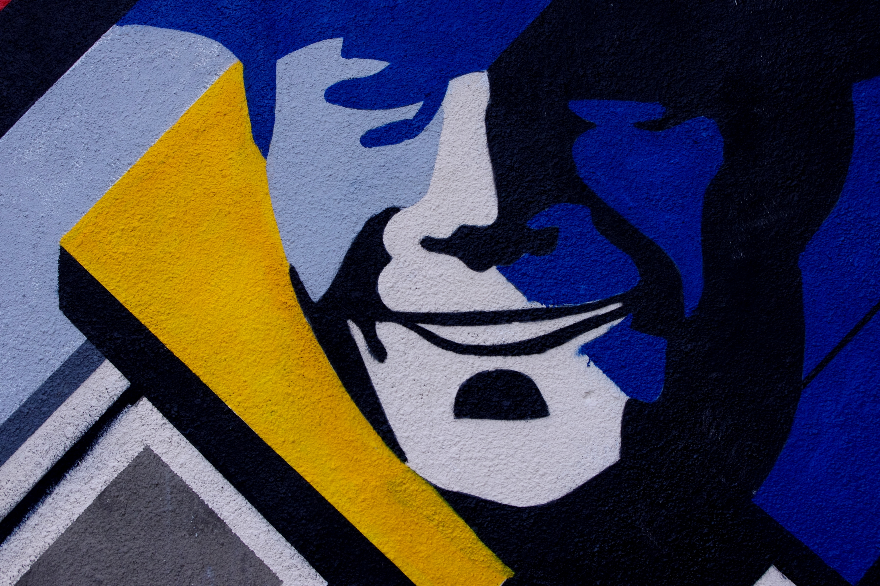 Mural upamiętniający Bohdana Lacherta na ul. Nowolipki w Warszawie